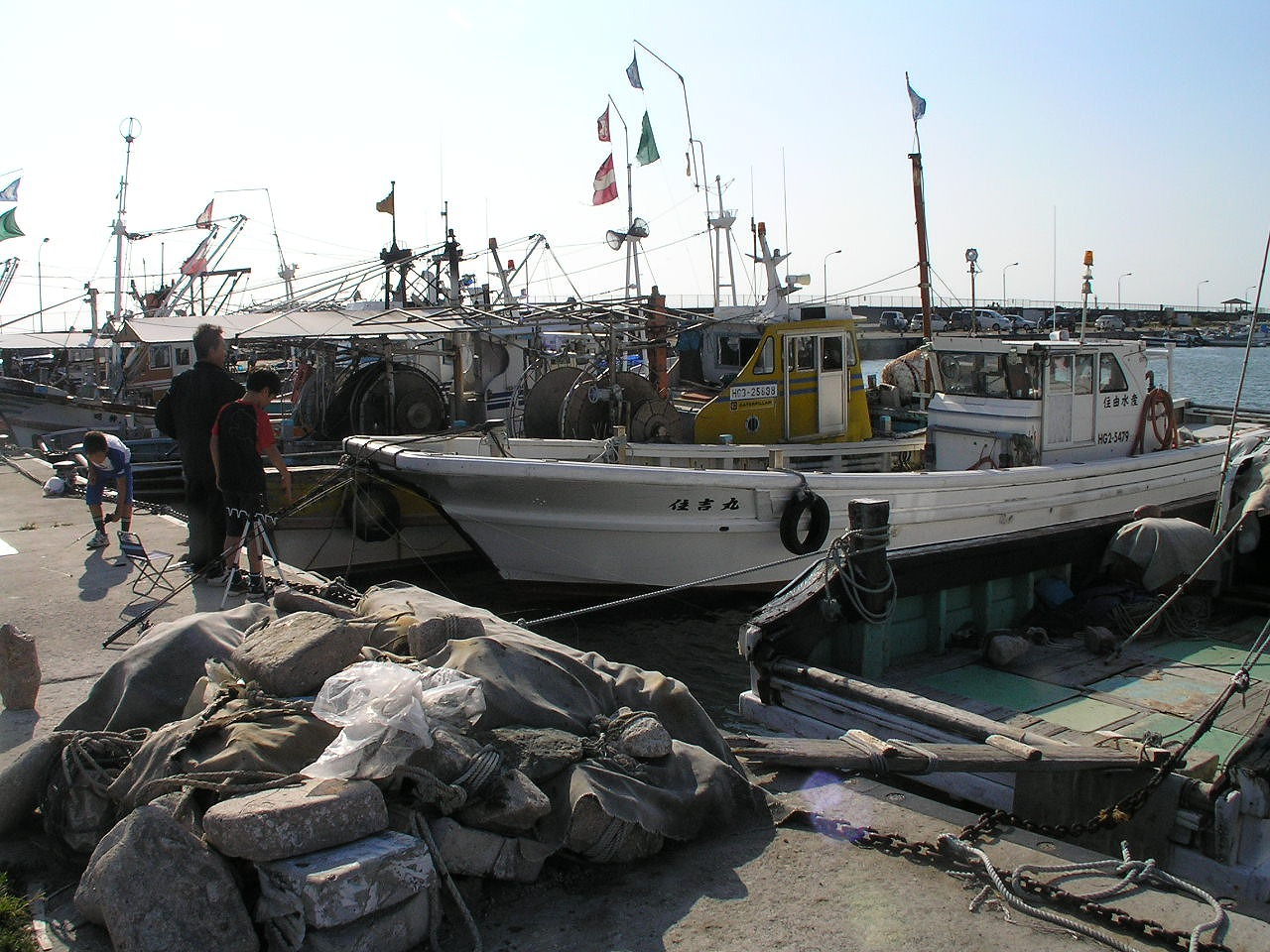 林崎漁港兵庫県